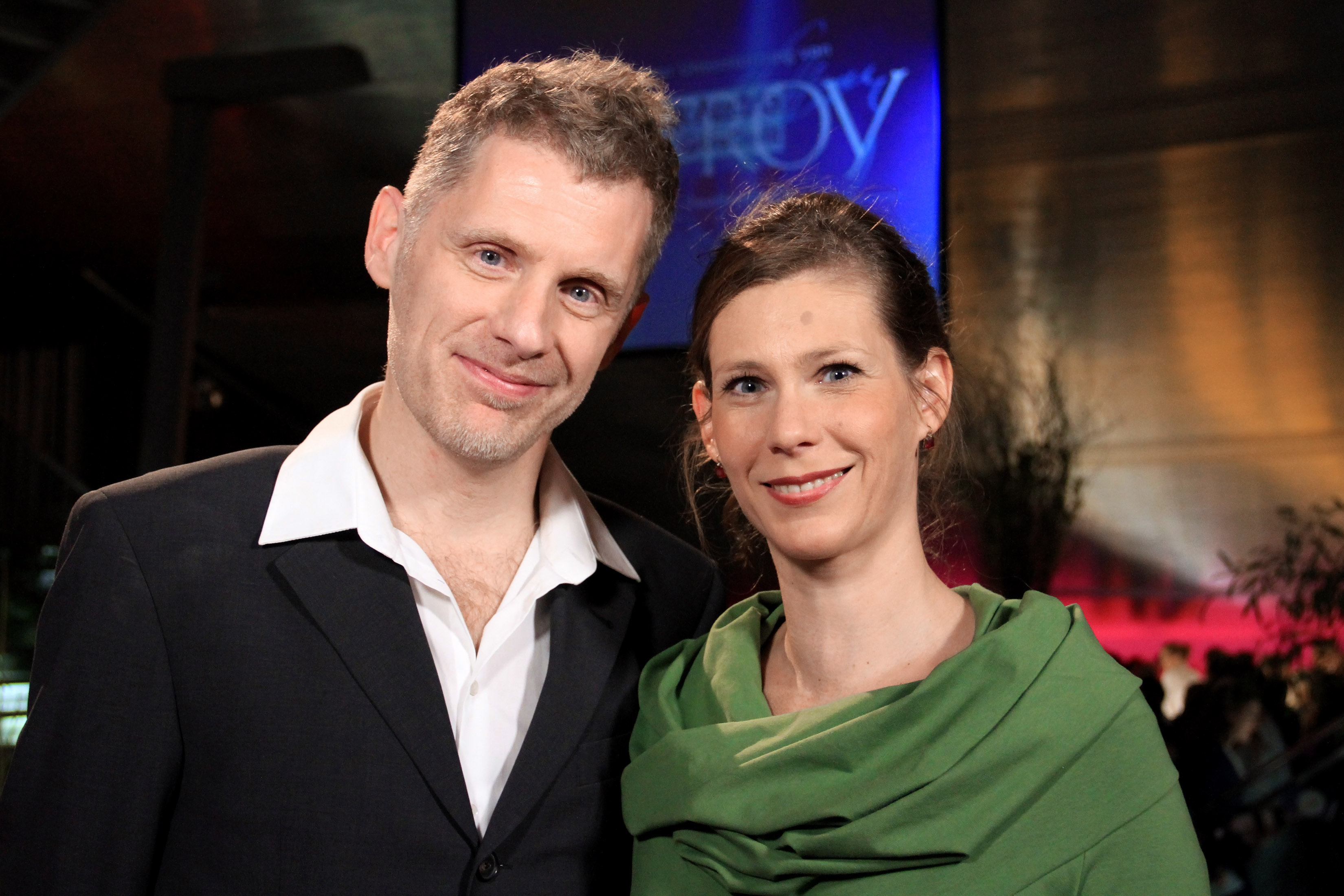 Gernot Plass, mit Hamlet Sein nominiert in der Kategorie Beste Off-Produktion, und Barbara Willensdorfer vom TAG - Theater an der Gumpendorfer Straße beim Nestroy-Theaterpreis 2012 im MuseumsQuartier in Wien, .